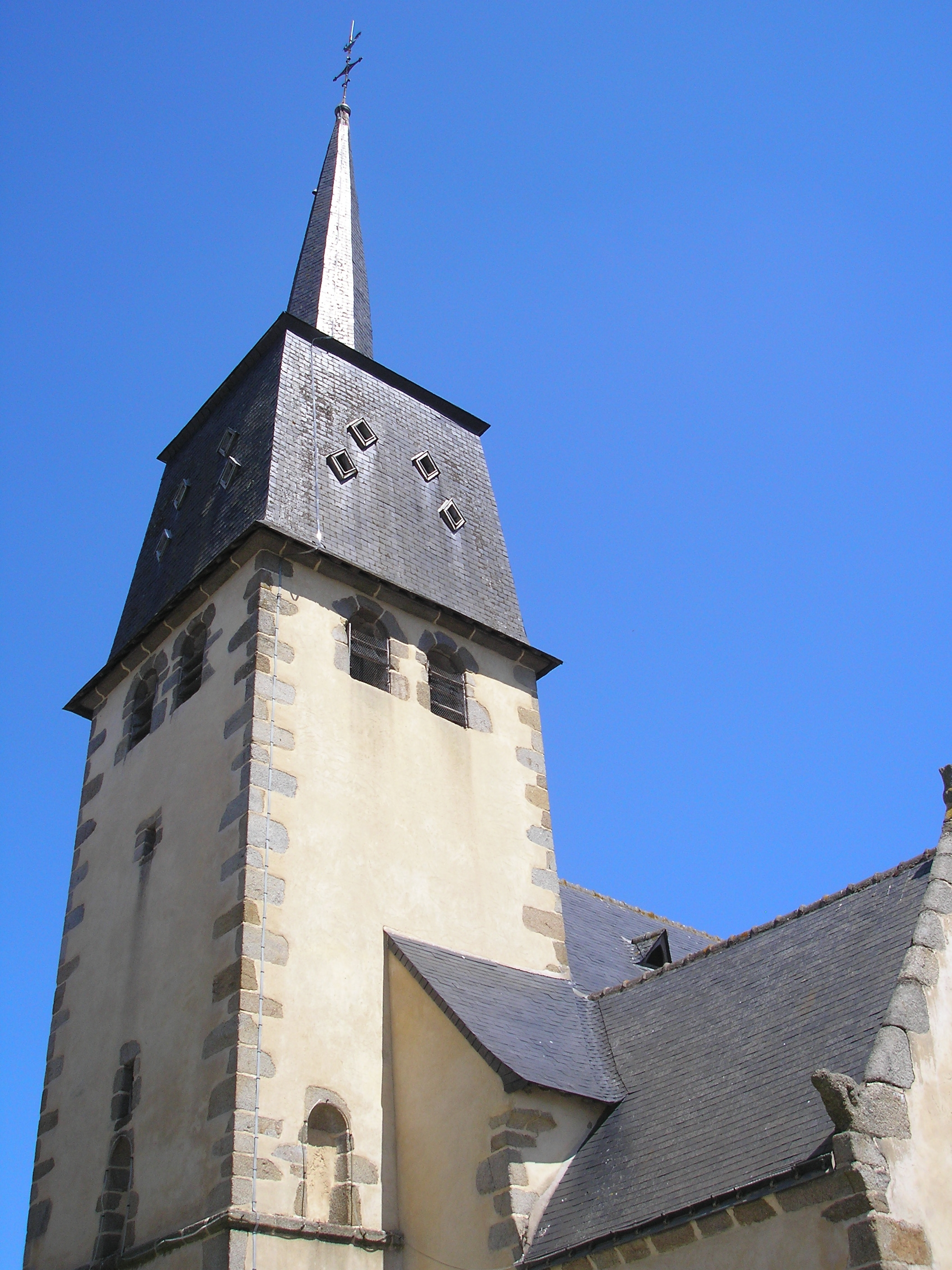 Bais (Pays de la Loire, France). Le clocher de l'église Notre-Dame-de-l'Assomption.